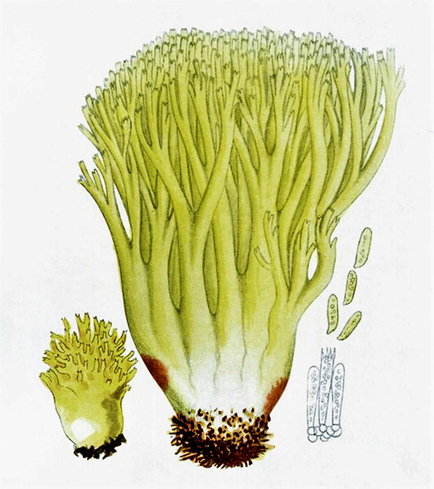 Giacomo Bresadola: Clavaria flava Schaeff. (1774), heute: Ramaria flava (Schaeff.) Quél. (1888)